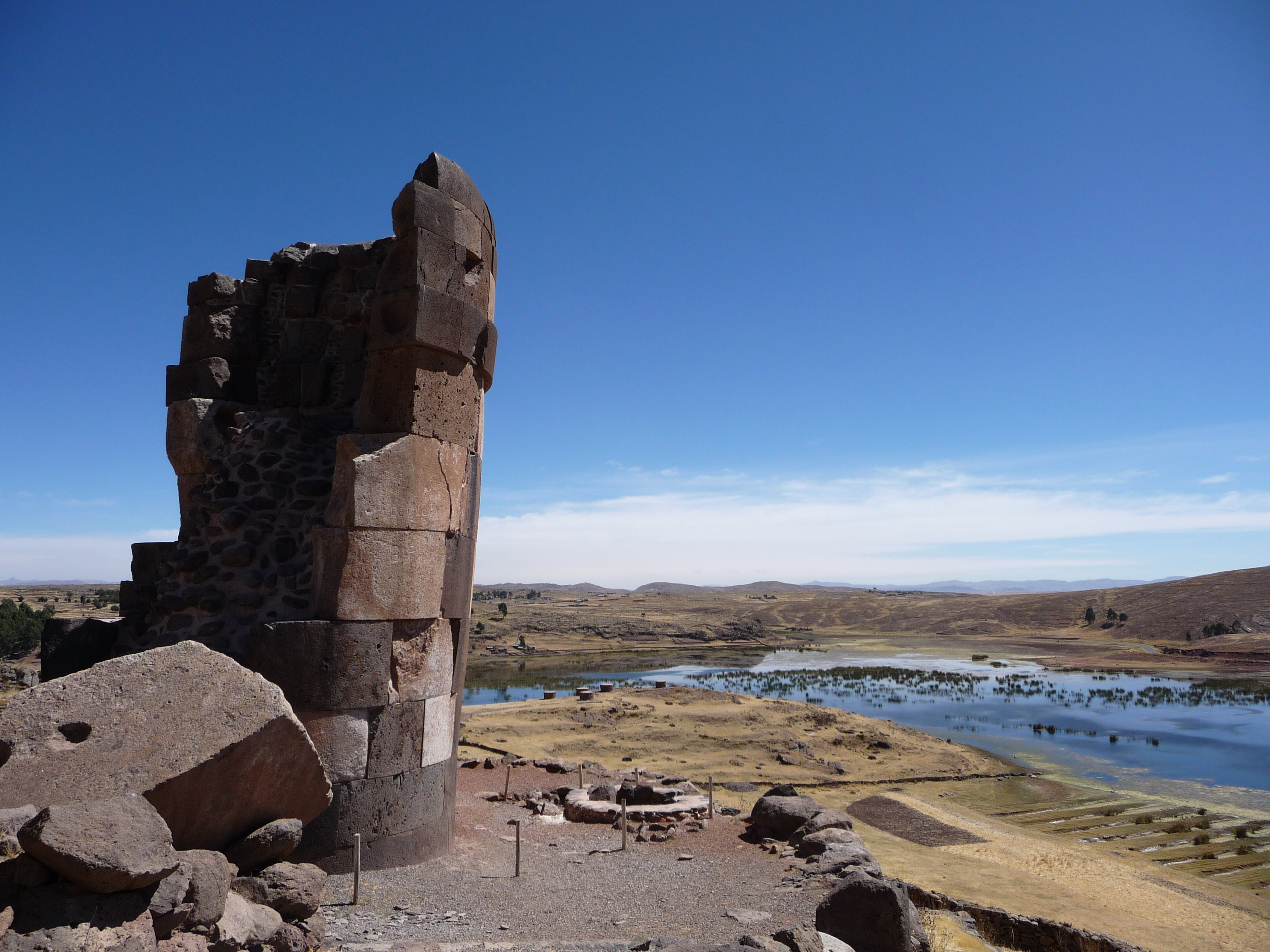 Sillustani, Puno, Puno Region, Peru